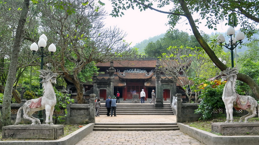 Đền Gióng, Sóc Sơn, Hà Nội